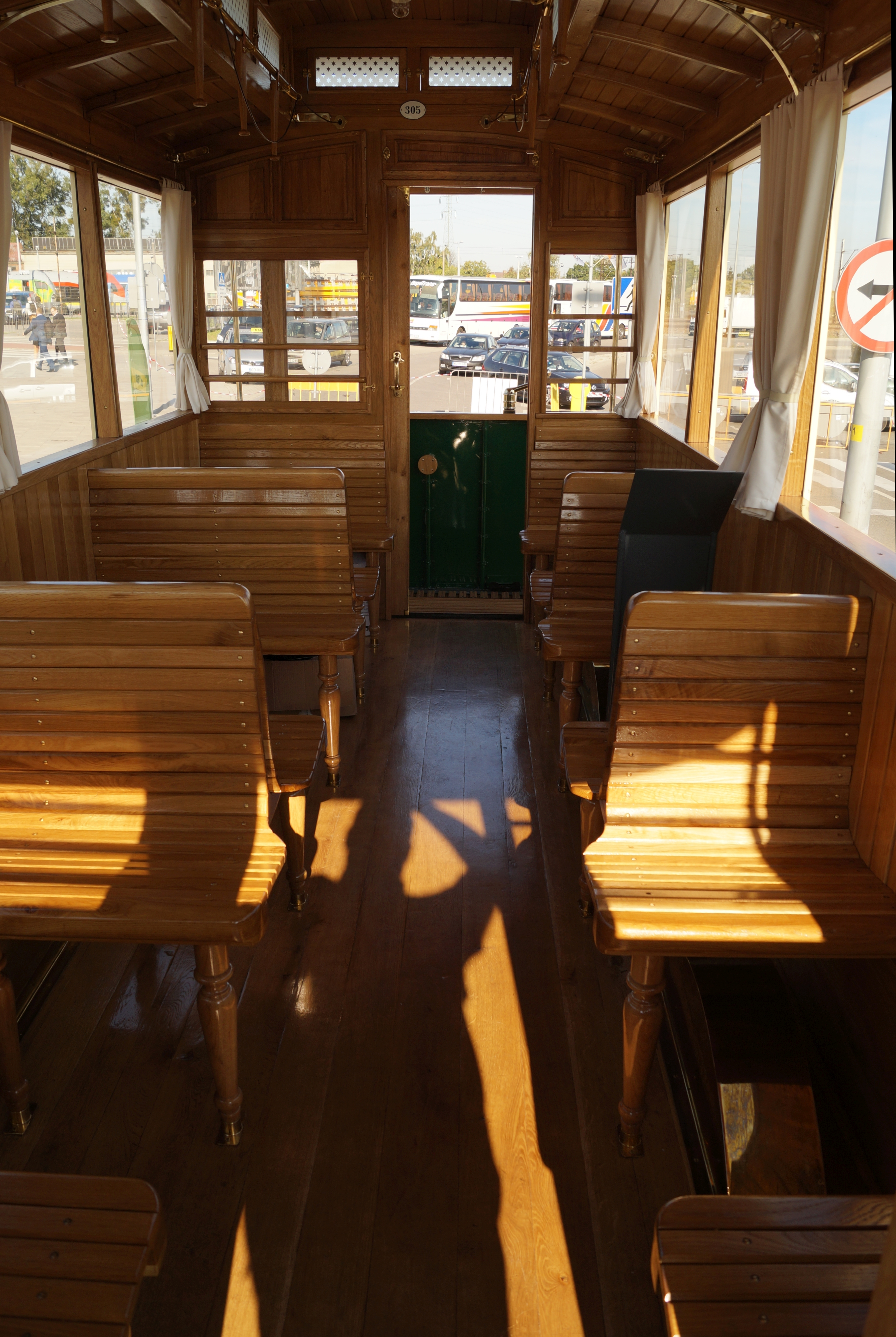 The making of this document was supported by Wikimedia Polska Association, within Wikigrant no. WG 2015-34. English | polski | +/− Wnętrze wagonu tramwajowego Carl Weyer (typ W) z 1905 roku należącego do MPK Poznań wystawianego na Targach Trako 2015